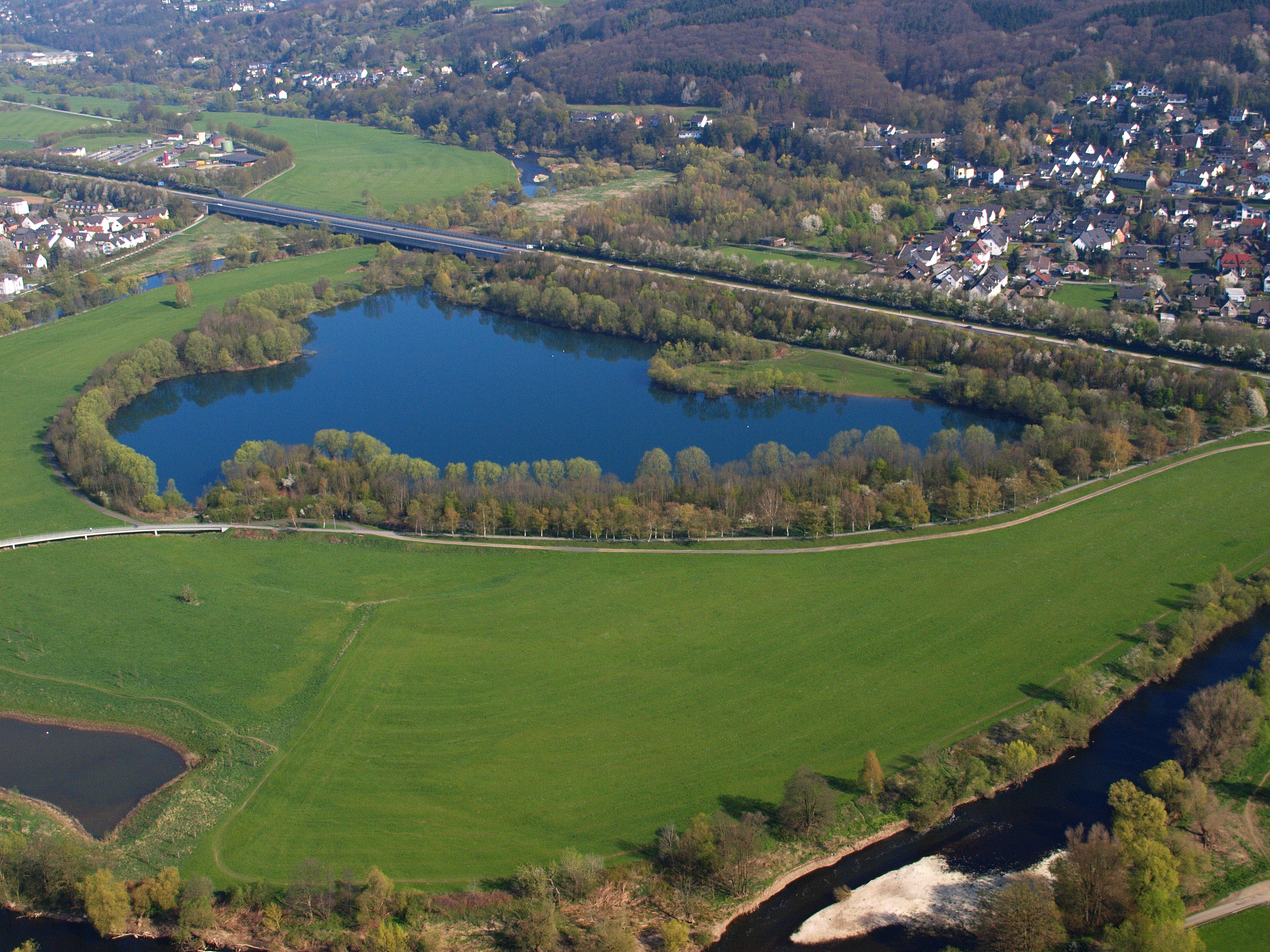 Bundesautobahn 560 bei Allner, Hennef (Sieg); Allner See und ein Teil des Naturschutzgebiets „Siegaue“ (NSG SU-093)